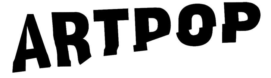 Logotipo utilizado en la carátula del disco ARTPOP de Lady Gaga, diseñado por Jeff Koons